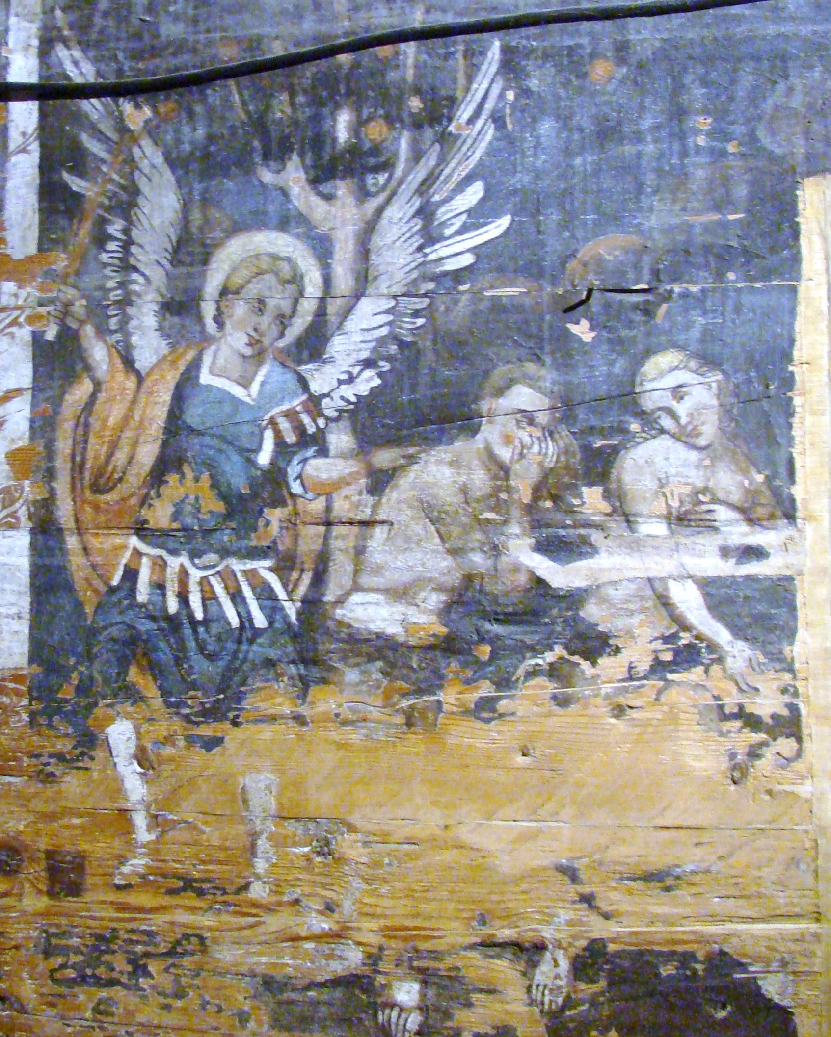 Biserica de lemn "Sf. Arhangheli", oraș Borșa, Str. Eternității 1